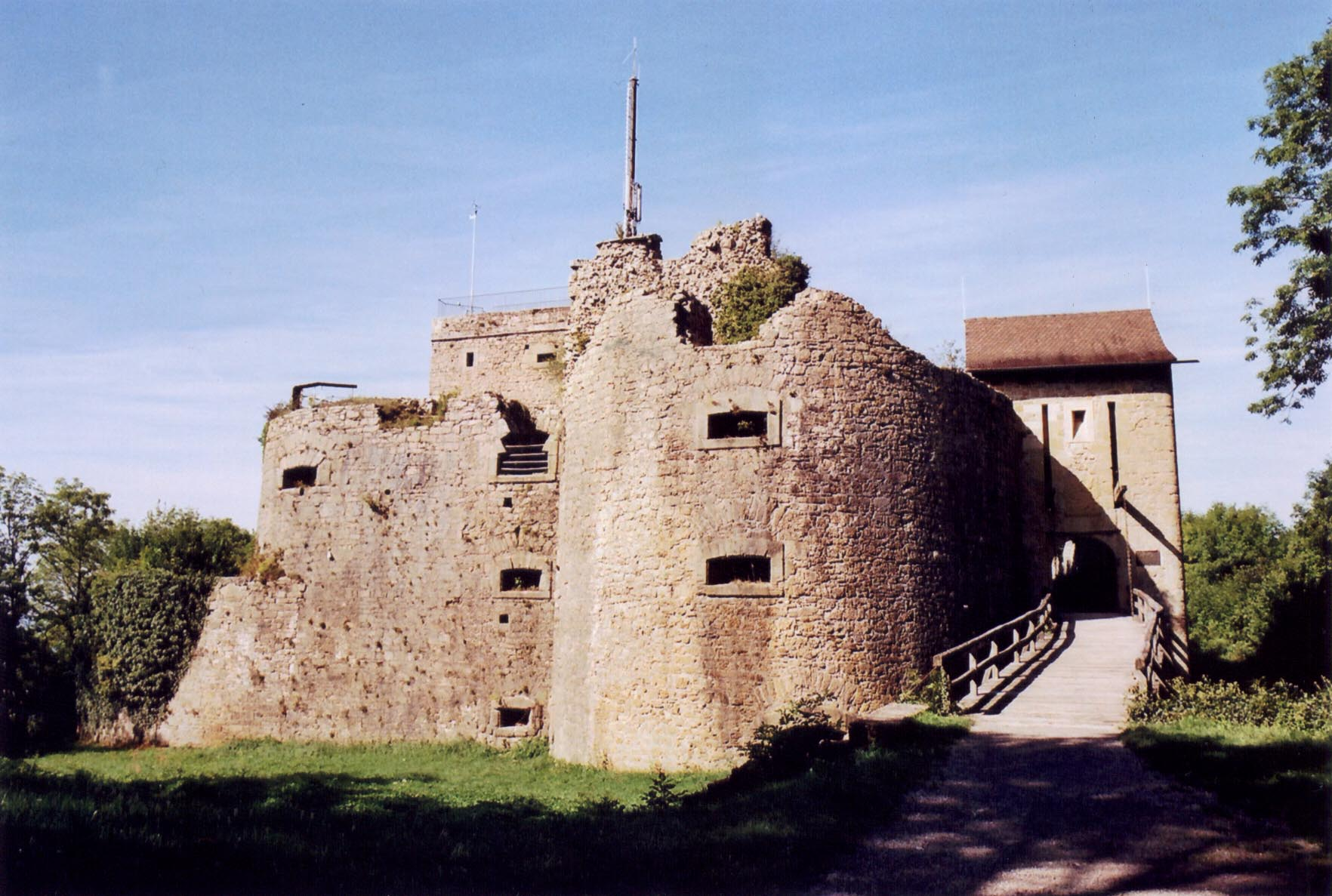 Küssaburg, Ostseite der Anlage